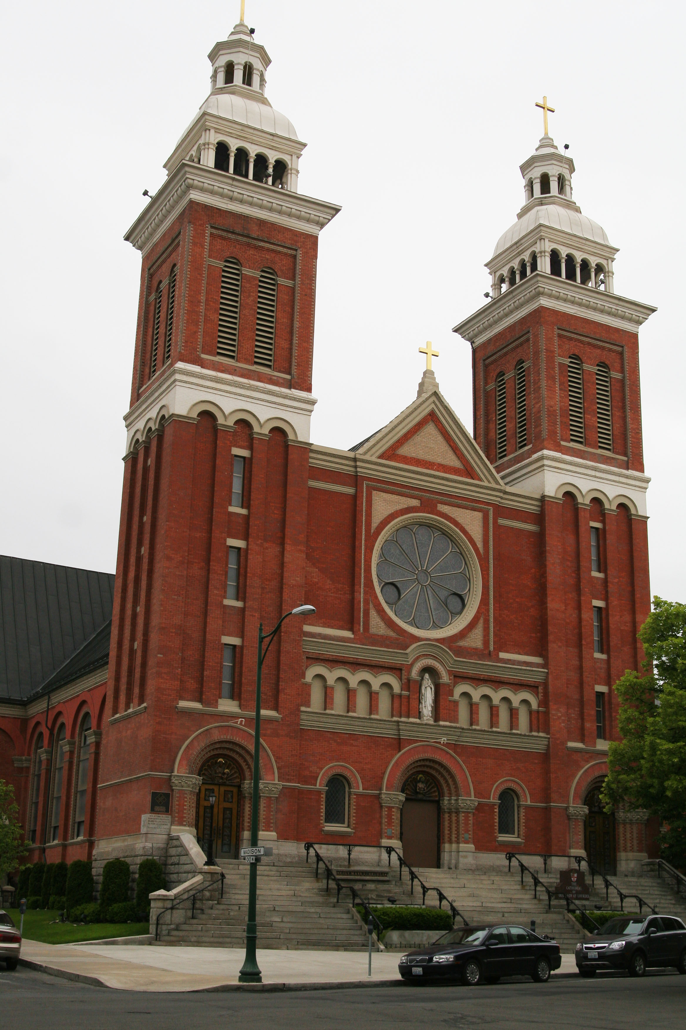 Cattedrale di Nostra Signora di Lourdes, a Spokane, nello stato USA di Washington.